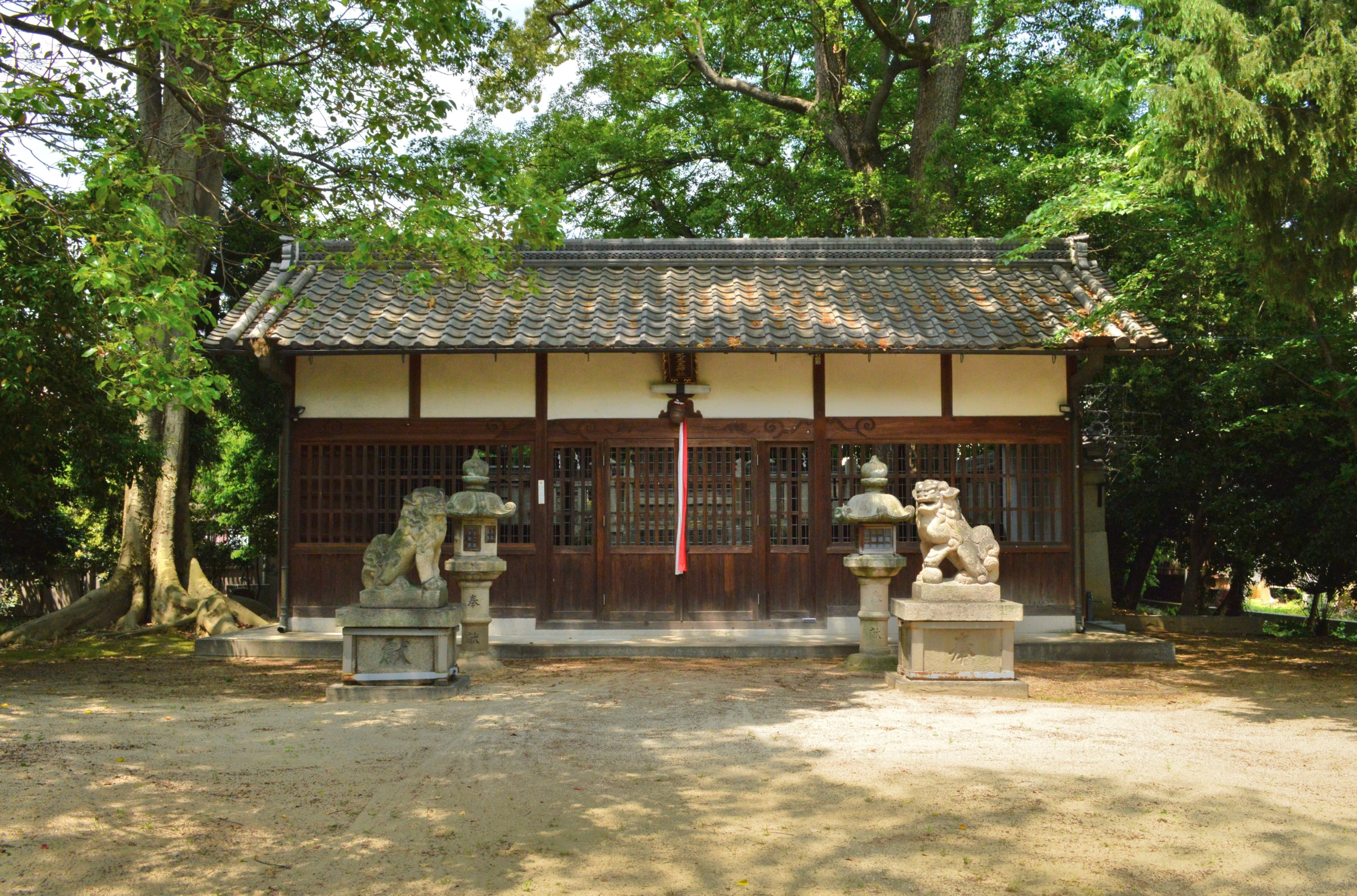 天太玉命神社 拝殿